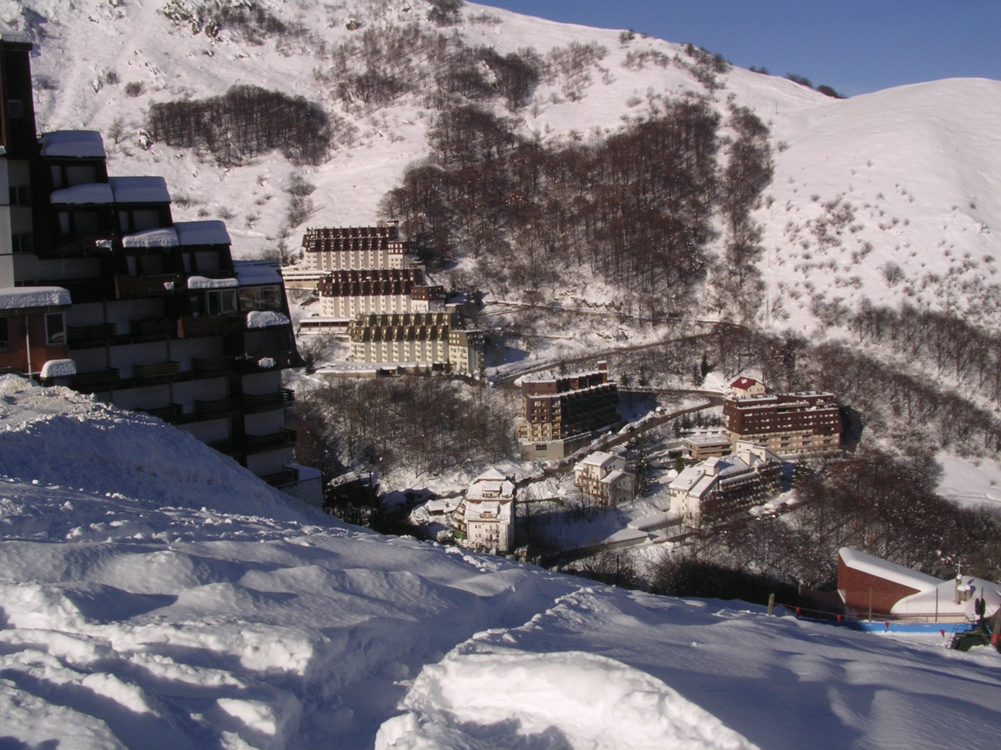 Vista dall'alto della stazione sciistica di Artesina